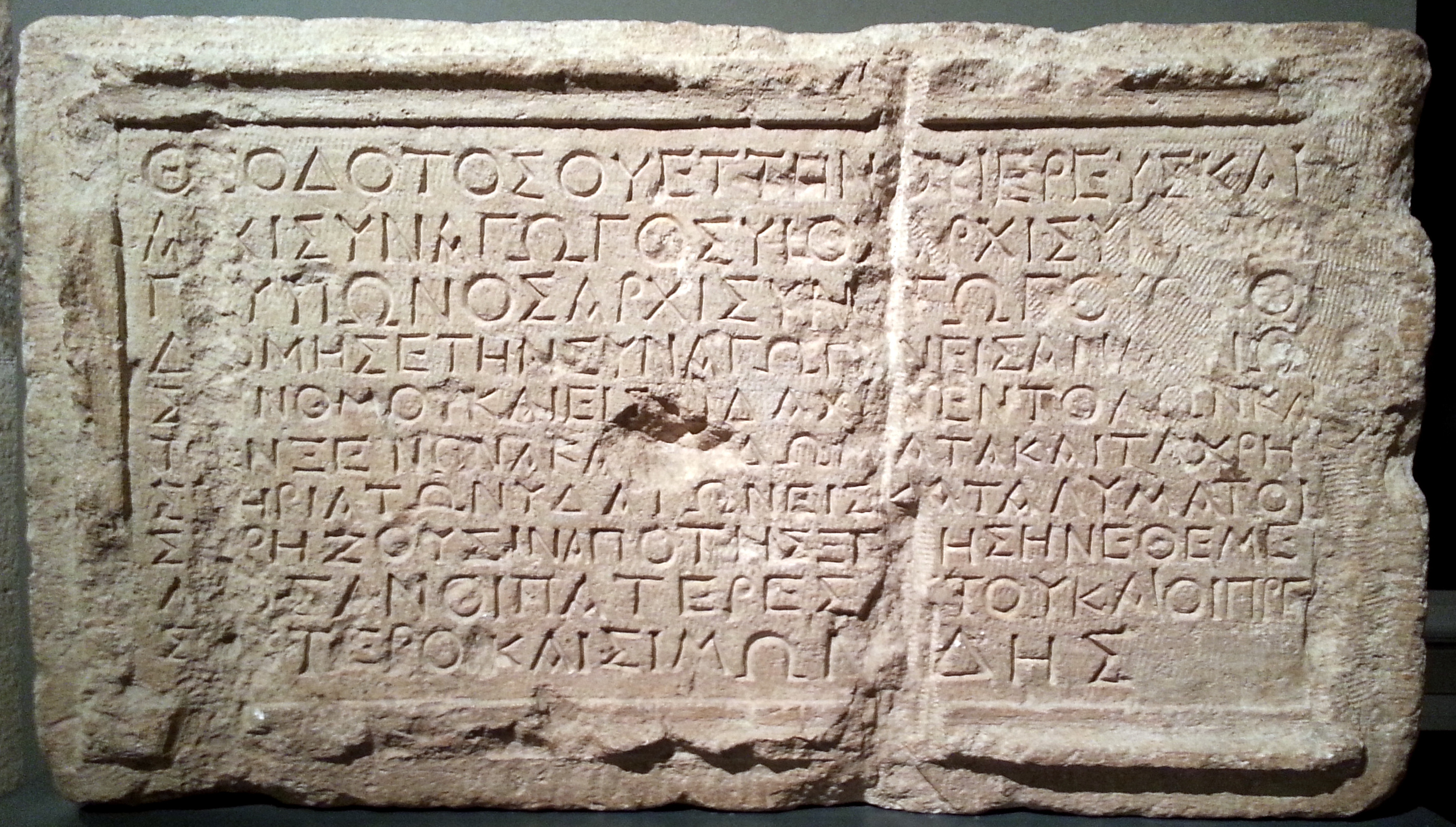 העתק כתובת תיאודוטוס מוצג במוזיאון ישראל בירושלים. הלוח נמצא בירושלים בראשית המאה ה-20 ונלקח למוזאון הארכאולוגי בירושלים